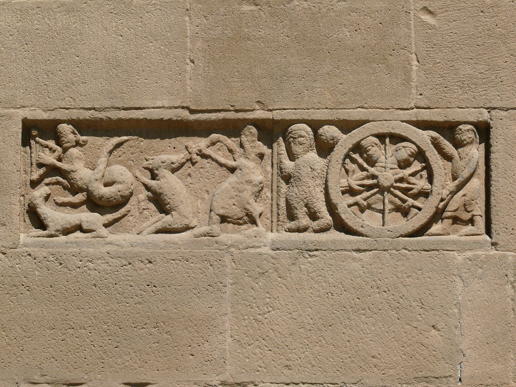 Schöngrabern, Romanische Pfarrkirche - Relief mit allegorischer Darstellung der Monate Dezember und Januar